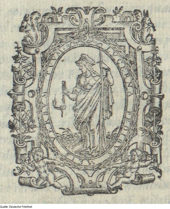 Original image description from the Deutsche Fotothek Druckermarke & Signet & Druckersignet & Druckerzeichen & Öllampe & Rollwerk